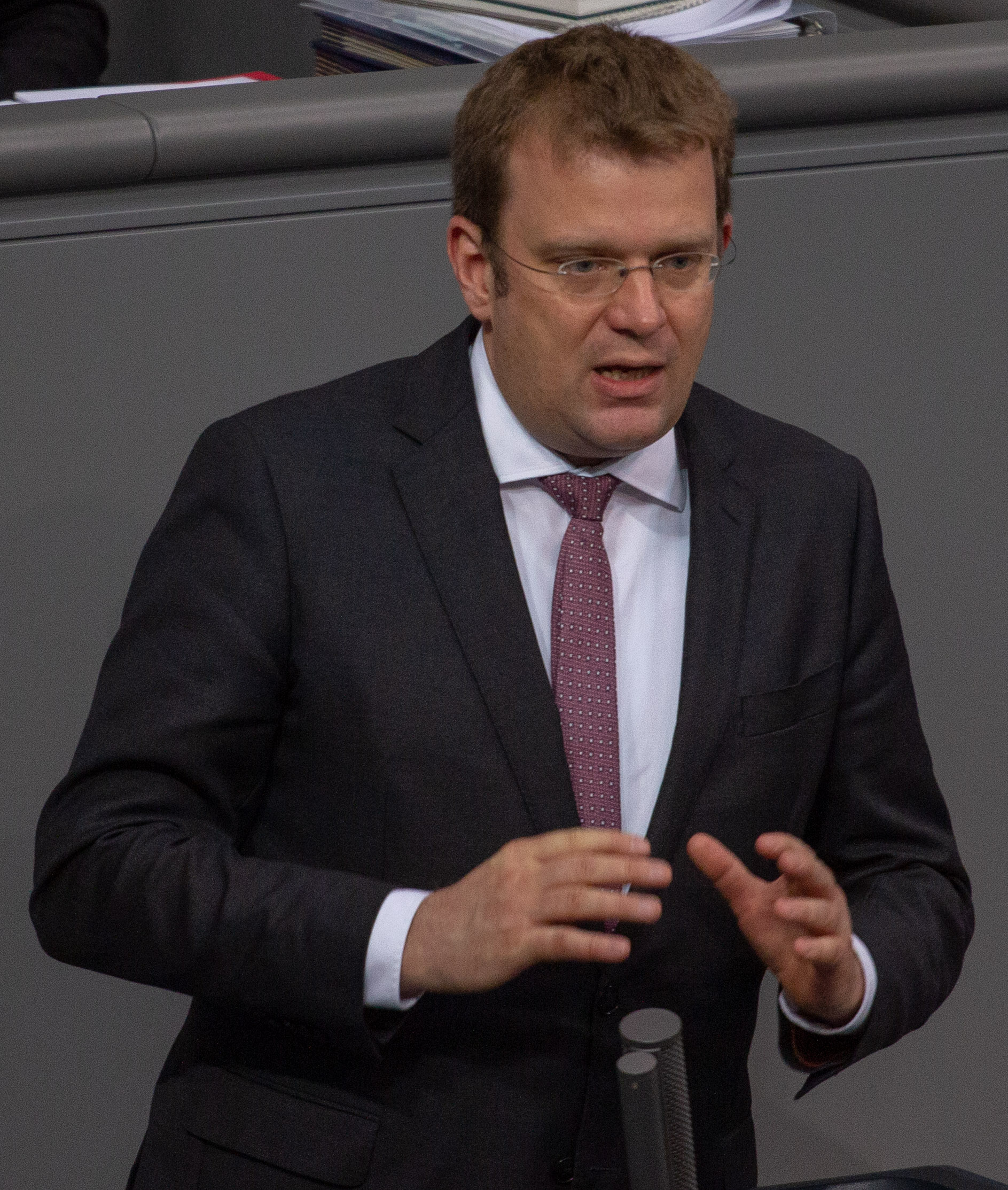 Reinhard Brandl, Mitglied des Deutschen Bundestages, während einer Plenarsitzung am 11. April 2019 in Berlin.